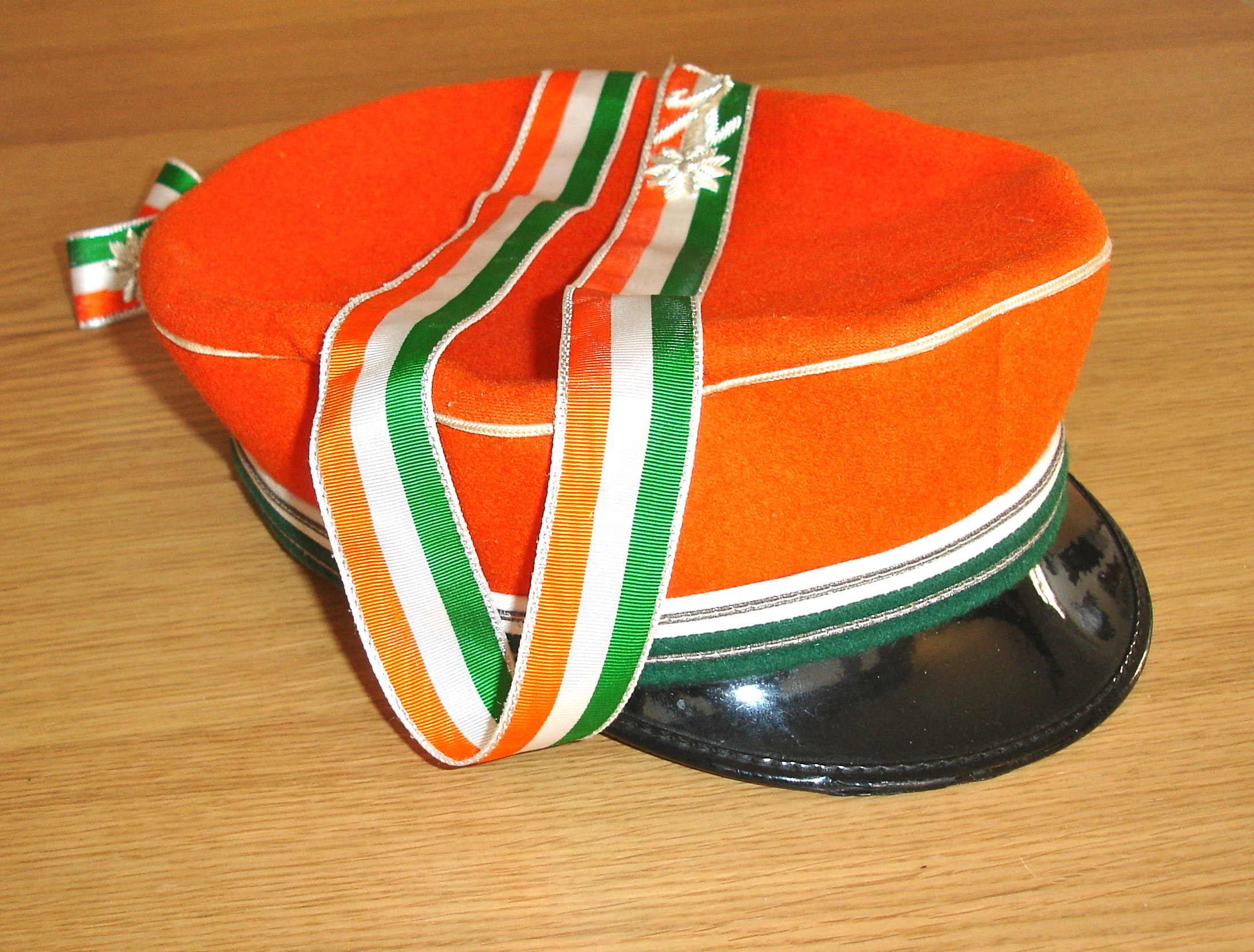 Die Farben der AV Fryburgia